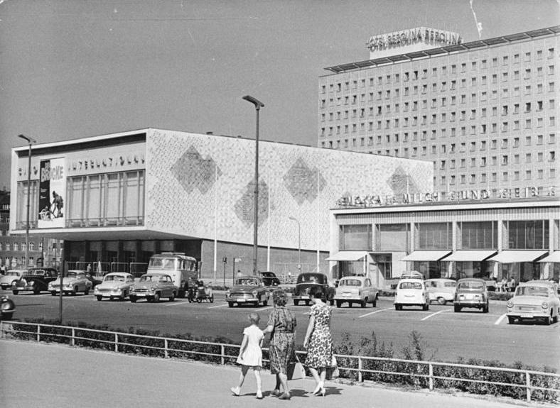 Zentralbild Spremberg Voigt 9.9.1964 Berliner Stadtansichten UBz: Blick in die Karl-Marx-Allee mit der Eisbar und dem modernen Kino "International".